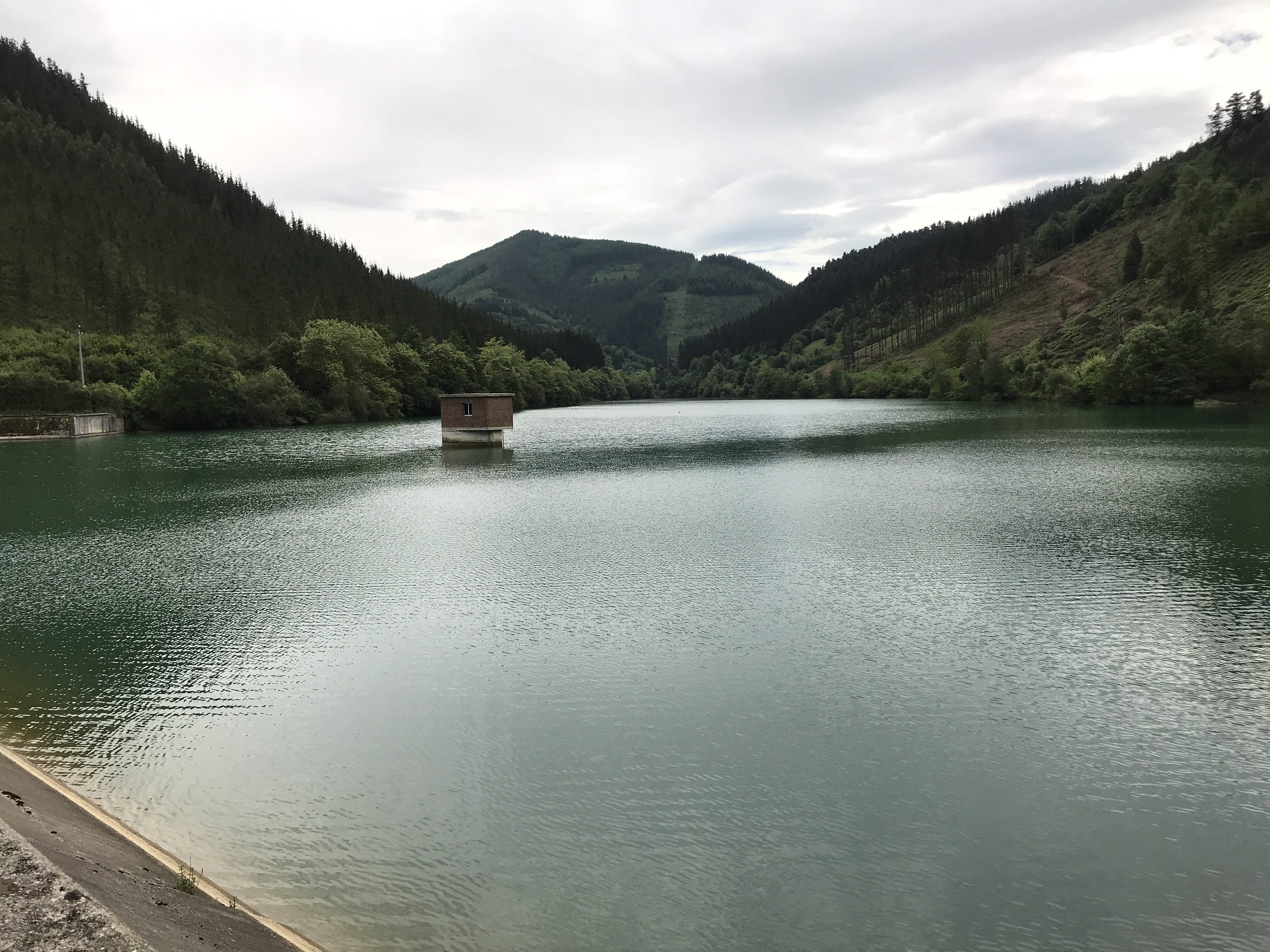 Vista parcial del embalse de Aixola en situado en el término municipal de la localidad guipuzcoana de Elgueta (País Vasco, España) que represa el río Aixola, perteneciente a la cuenca del Deva, formando un embalse destinado al consumo de agua potable.